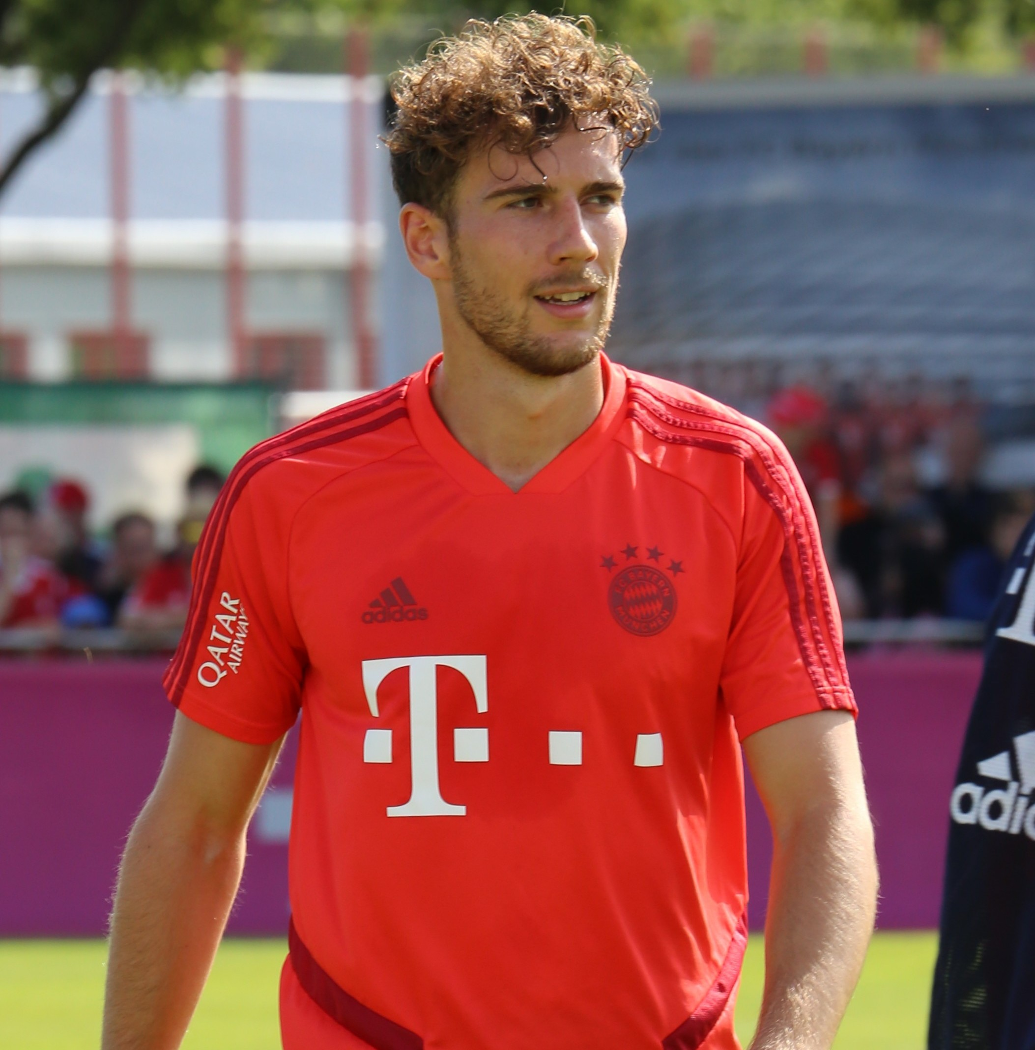 Leon Goretzka, am 1. September 2019 beim Training auf dem Gelände des FC Bayern München